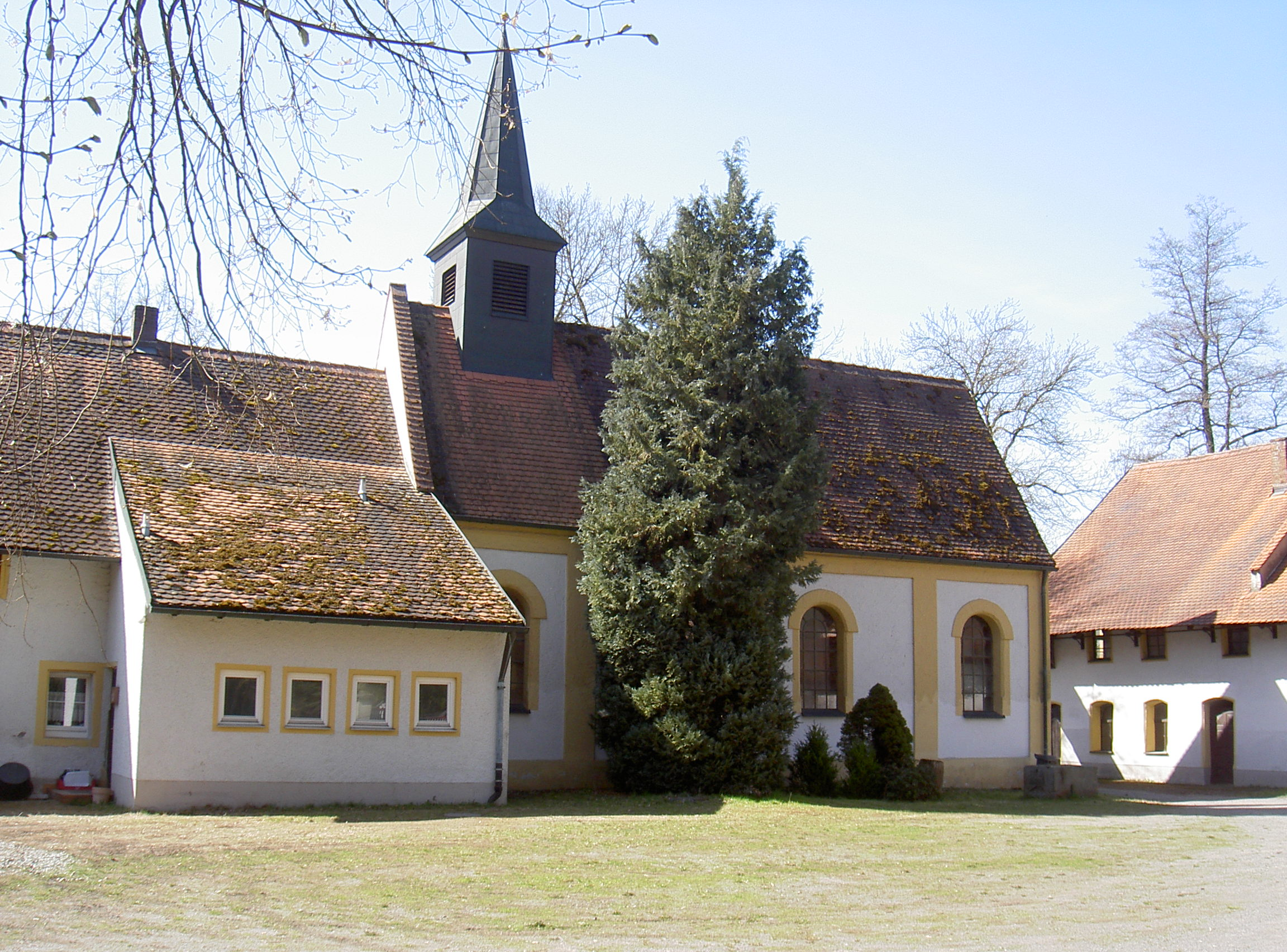 Hammerschloss (Unterwildenau)